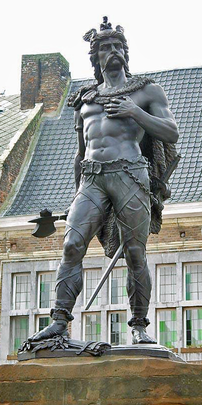 Denkmal des Ambiorix